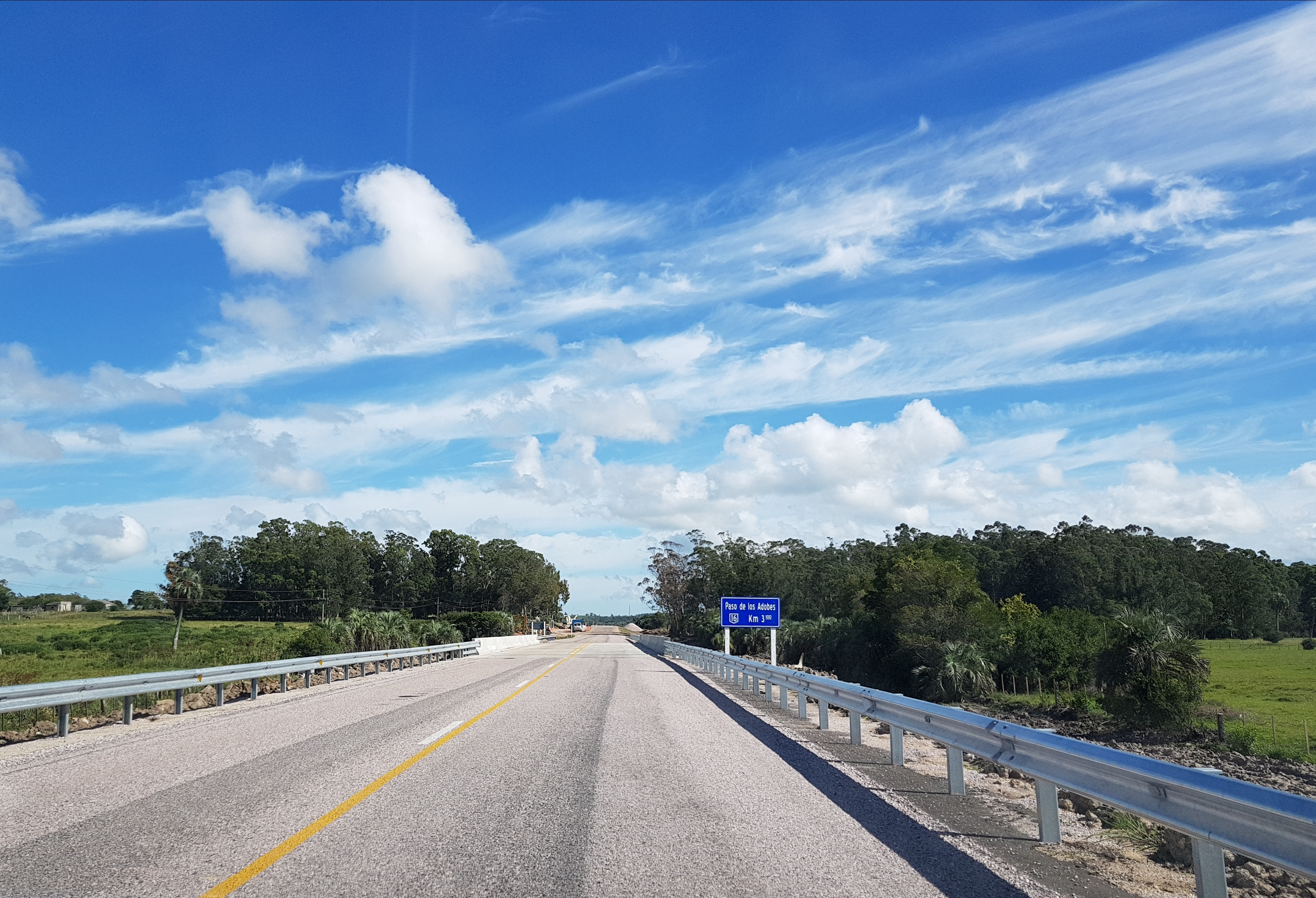 Ruta 16 a la altura del Paso de los Adobes, Rocha, Uruguay